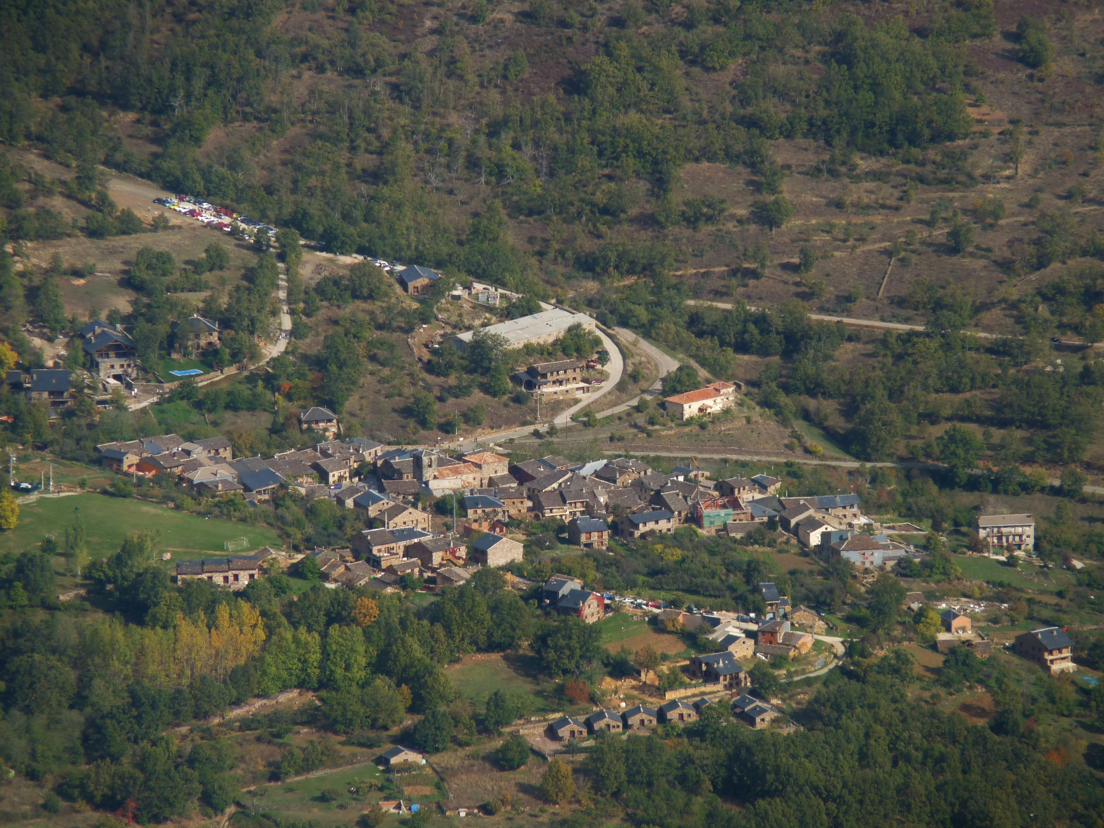 Vista de Valverde de los Arroyos desde la cima del pico Ocejón.